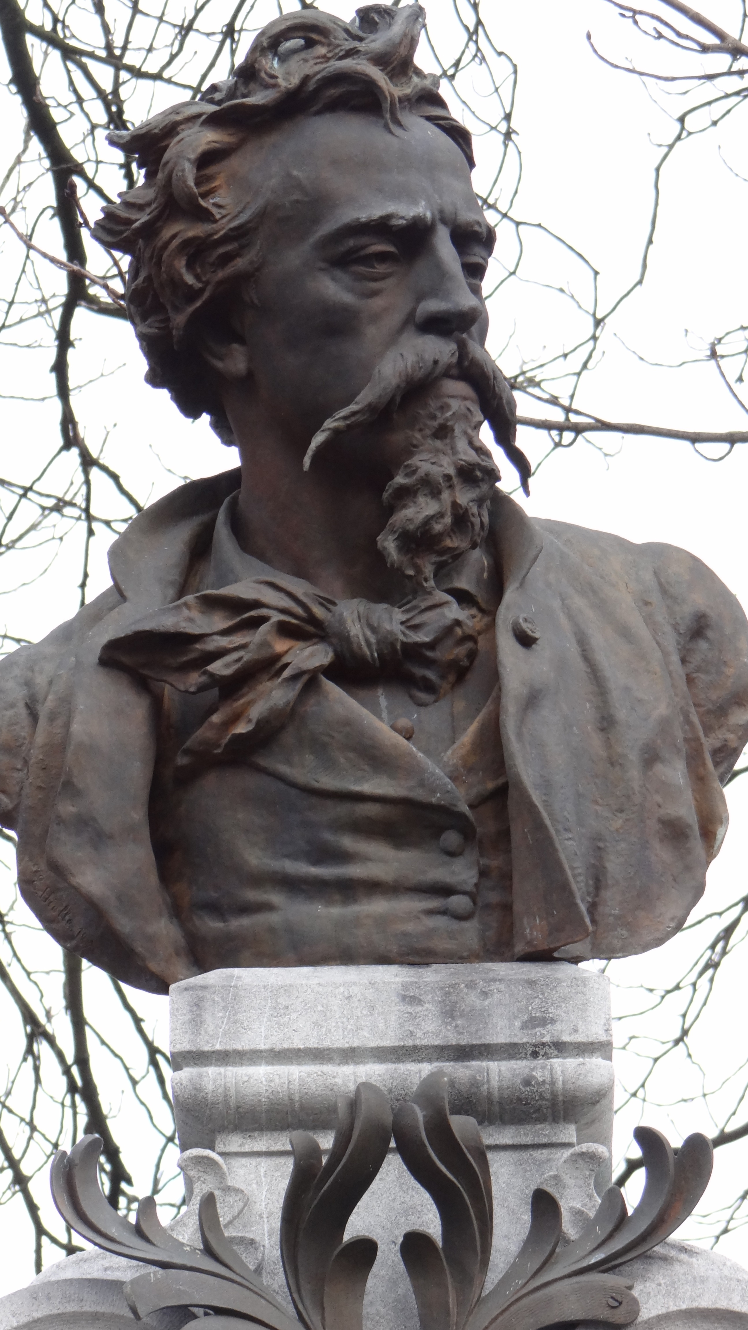 Valenciennes - cimetière des Prix de Rome - -Jean-Baptiste Carpeaux